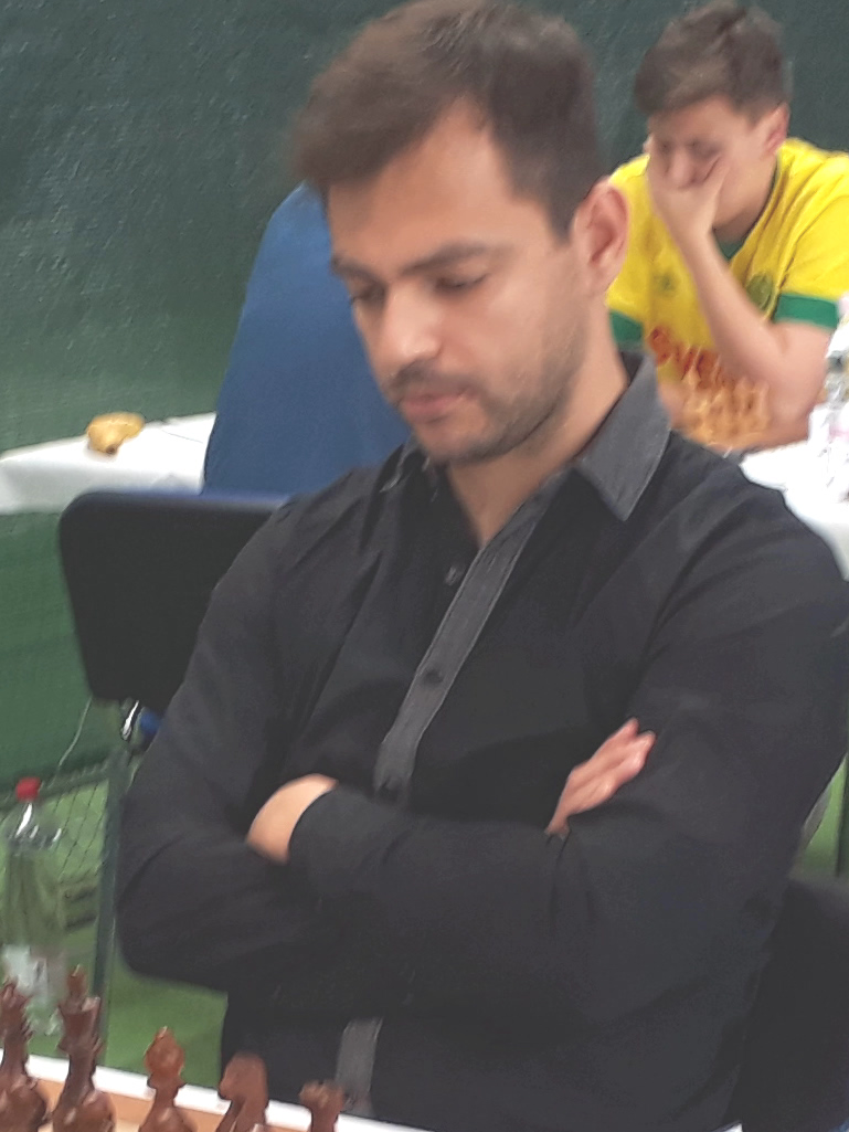 Luca Shytaj, Runde 4 Mitropa Cup 2019 in Radenci.